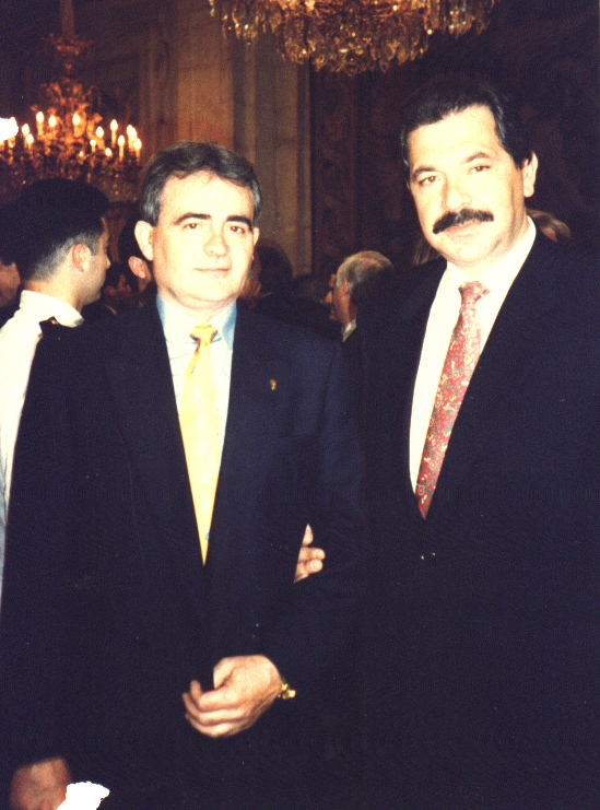 Con Cortés-Elvira, Secretario de Estado del Deporte y presidente del Consejo Superior de Deportes